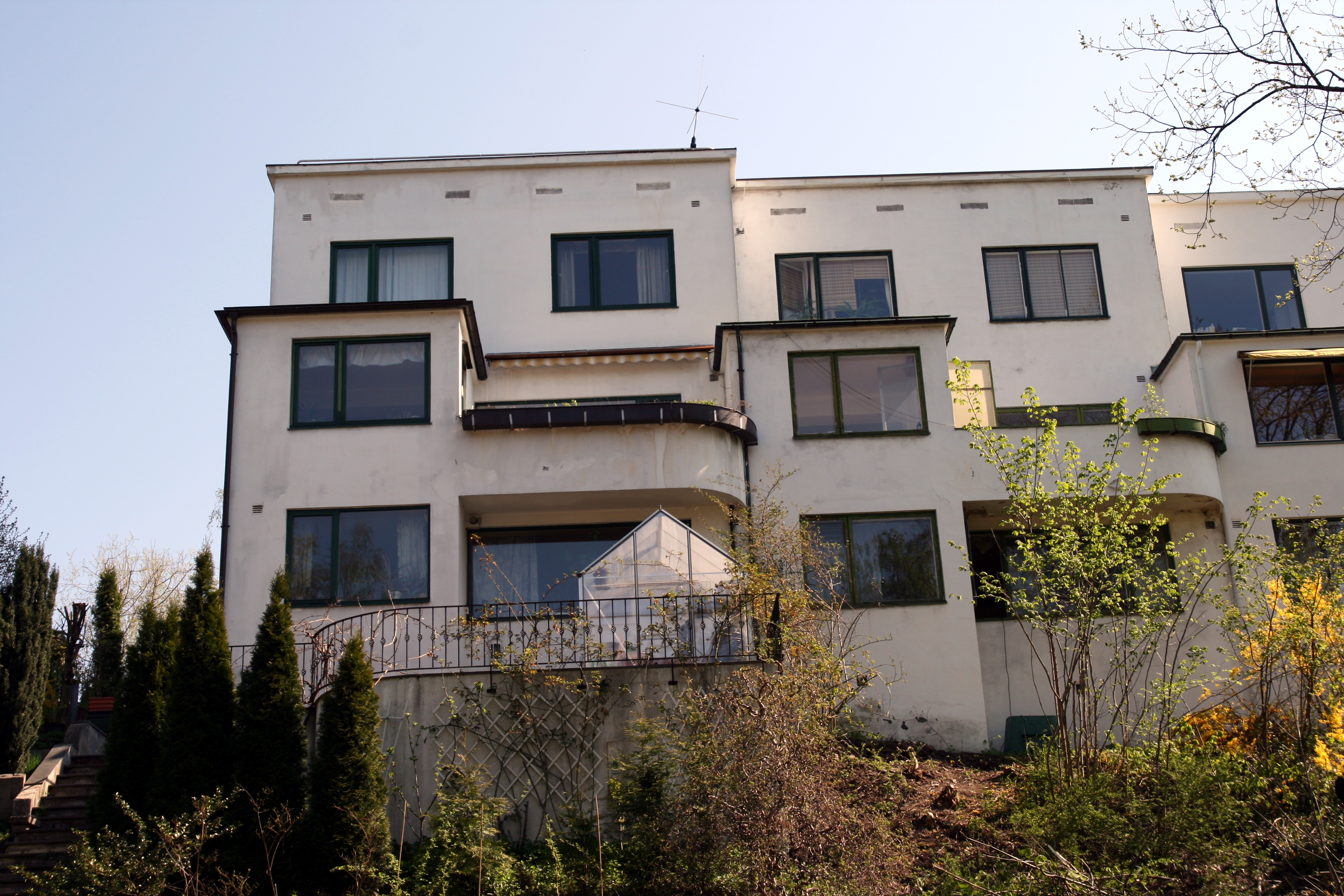 Ottar Birtings gate 5 i Oslo.